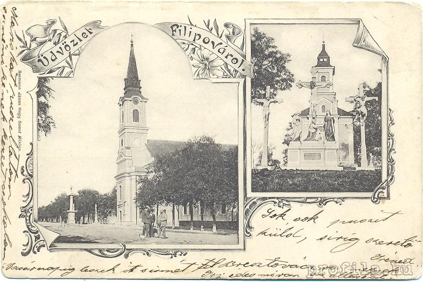 Szent Fülöp római katolikus templom és temetőkápolna 1902-es képeslapon